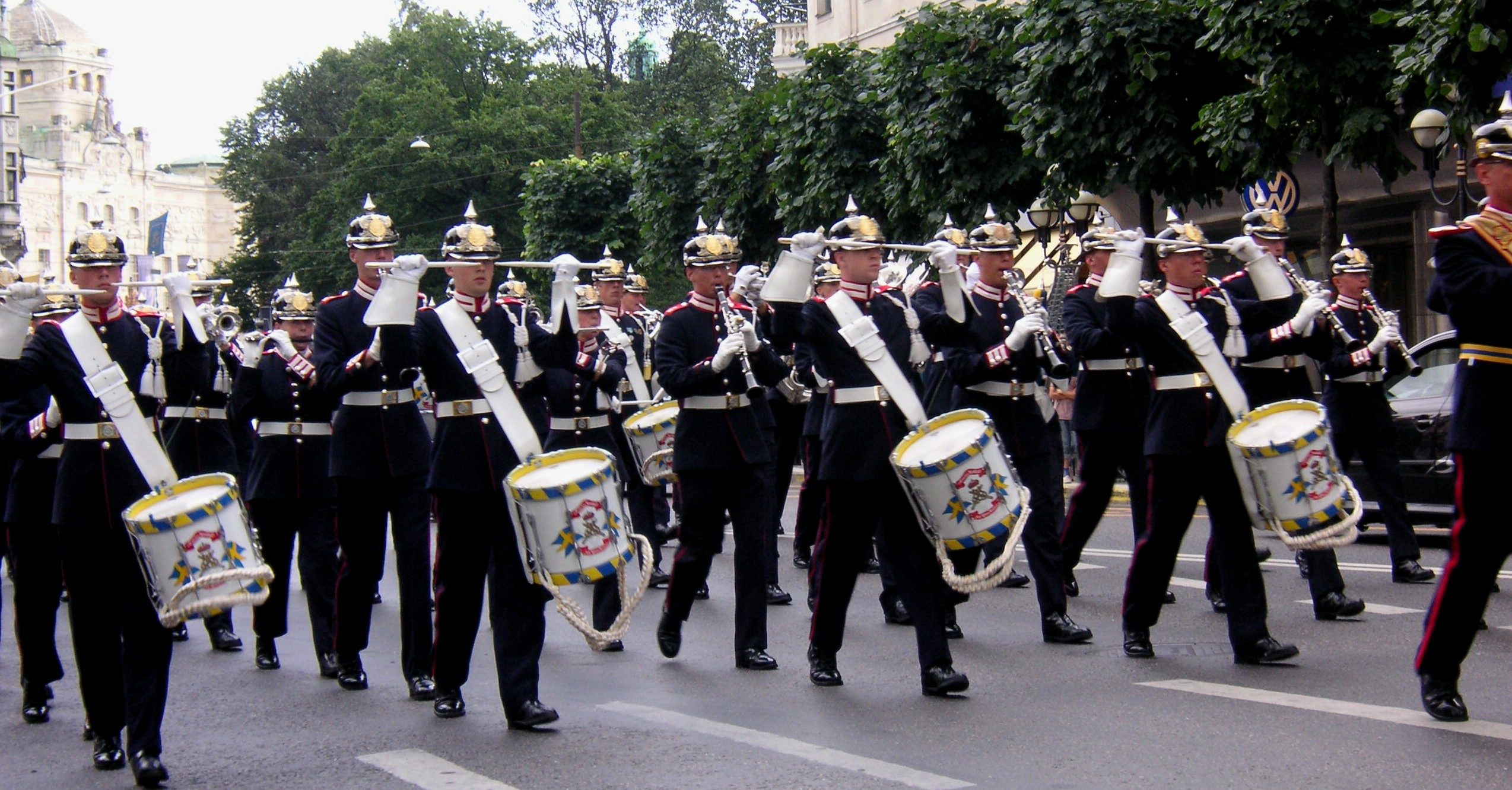 Vaktparaden i Stockholm